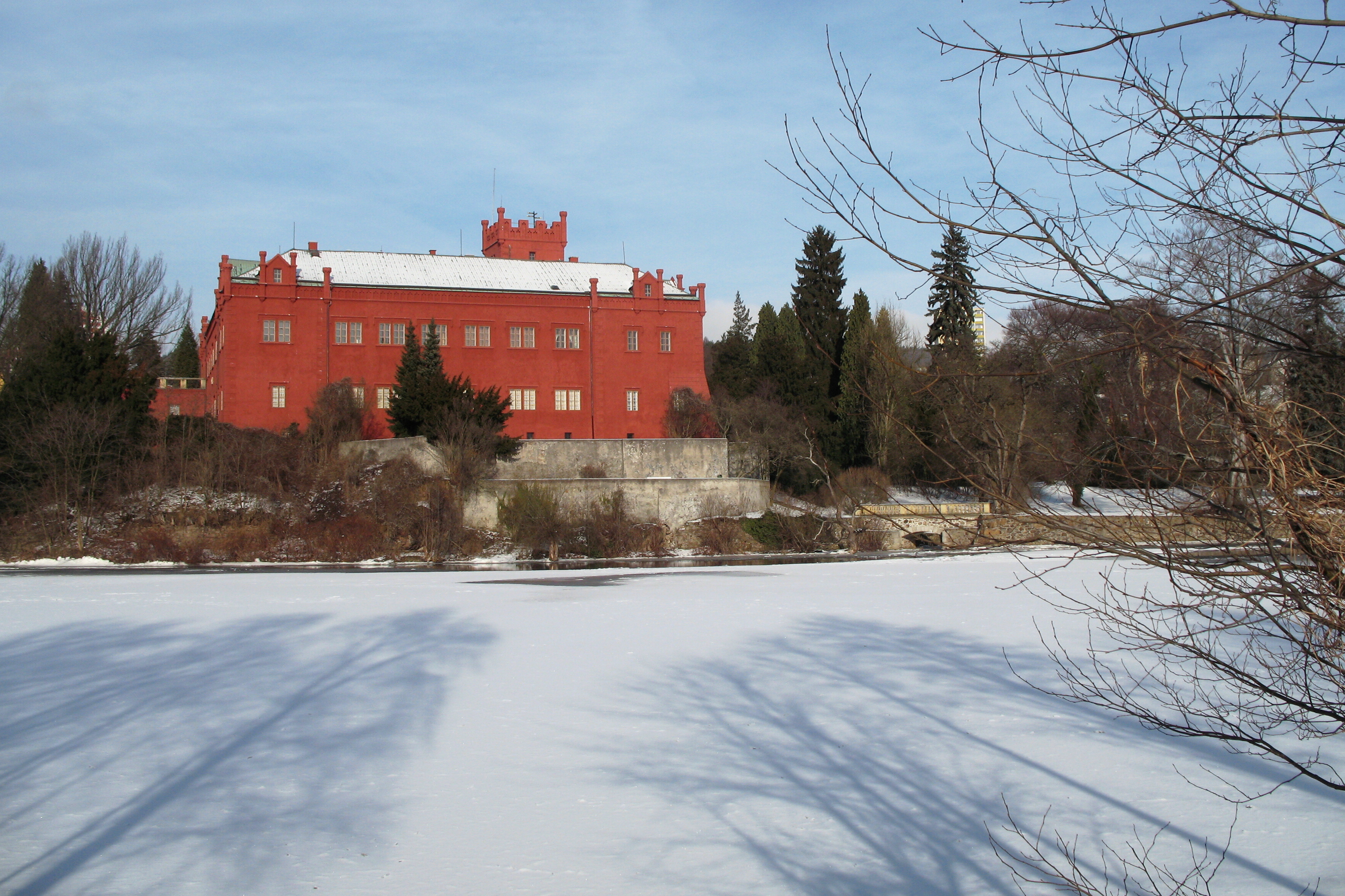 Zámek Klášterec nad Ohří, Klášterec nad Ohří 1, Klášterec nad Ohří - - zimní pohled na zámek v Klášterci nad Ohří přes zamrzlou řeku Ohři